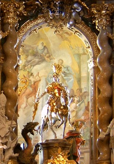 Weltenburger Altarbild mit dem Hl. Georg